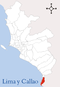 Localización del Distrito de Pucusana Imagen elaborada por --Edgardo Reyes 21:53 9 mar, 2005 (CET) Categoría:Mapas del Perú (imagen)